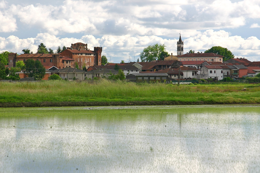 Panorama di Nibbiola (NO) col il castello e la chiesa.